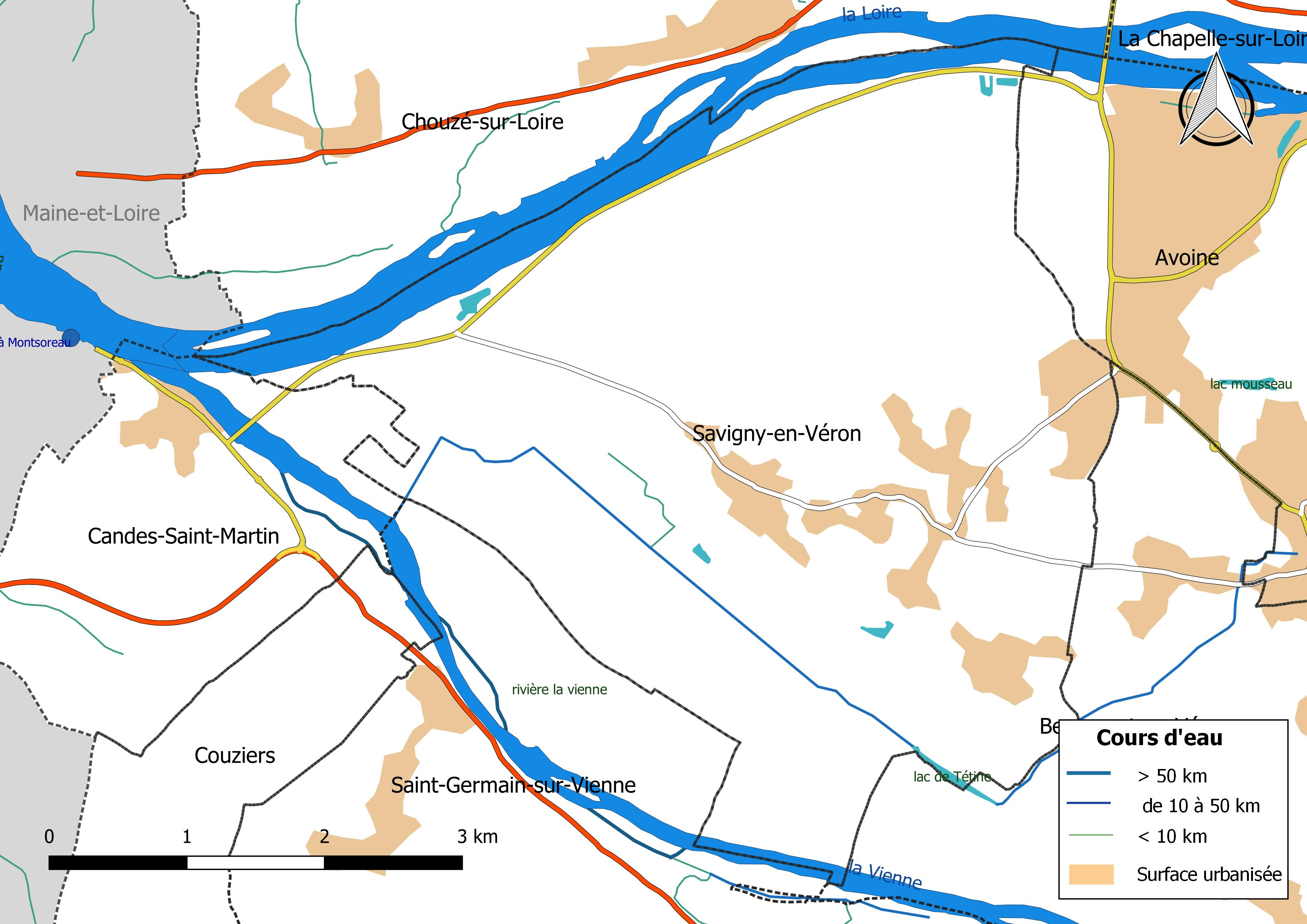 Carte du réseau hydrographique de la commune de Savigny-en-Véron (France).